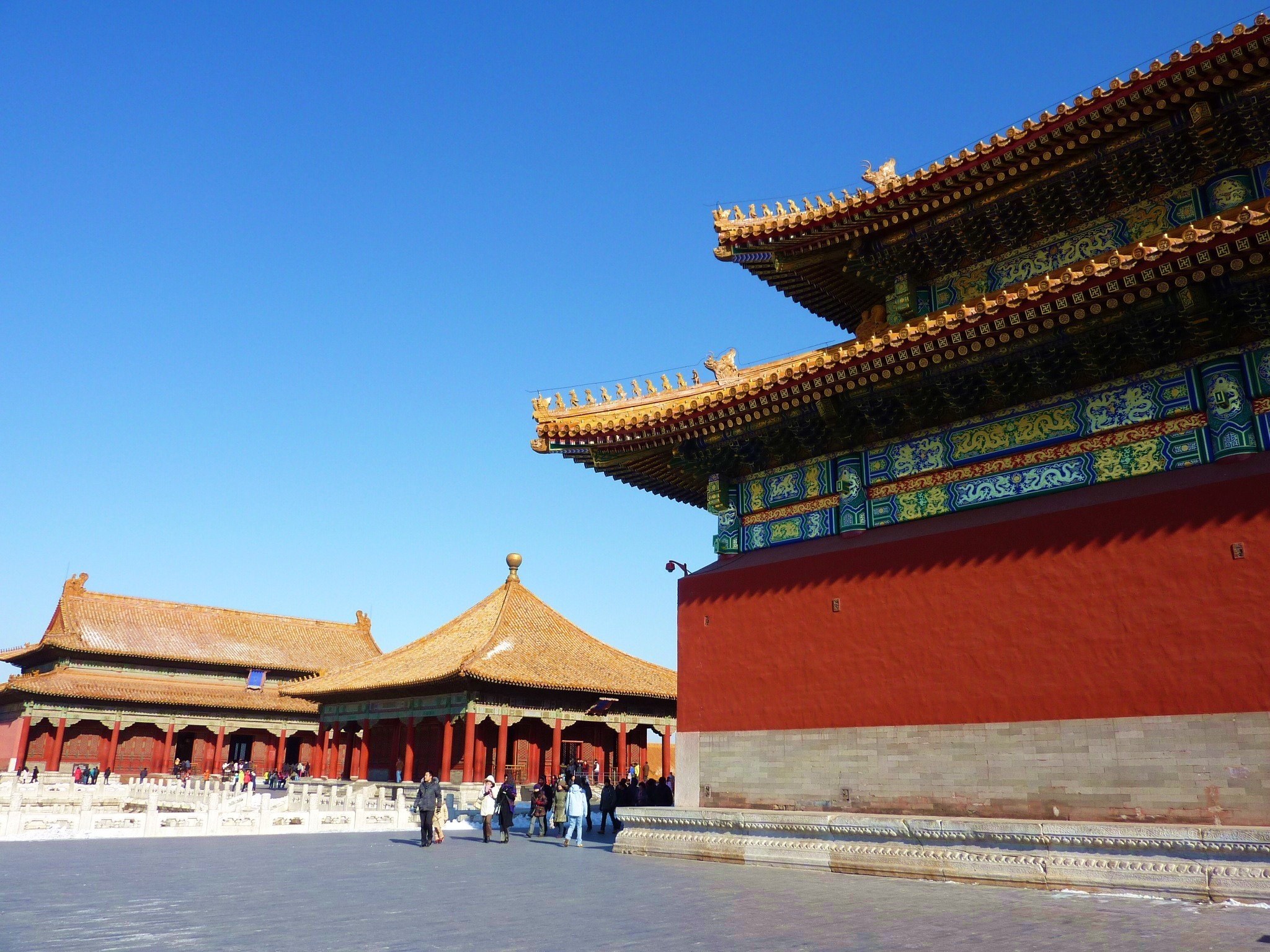 ·˙·ChinaUli2010·.· Beijing - Forbidden Town